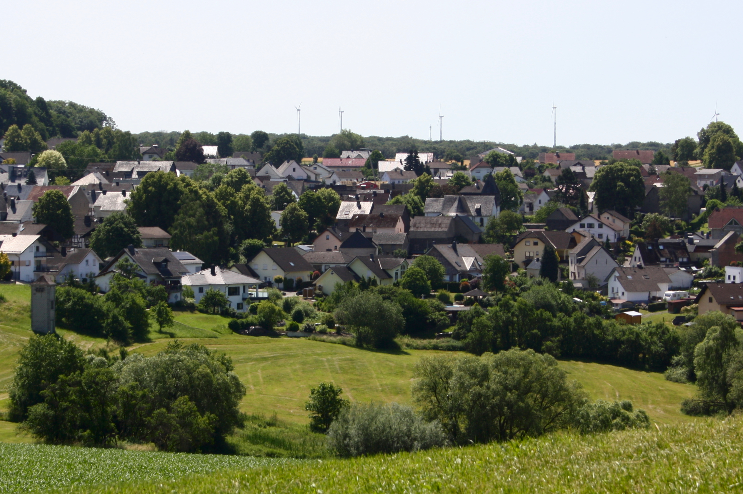 Nomborn, Westerwald, Rheinland-Pfalz, Deutschland